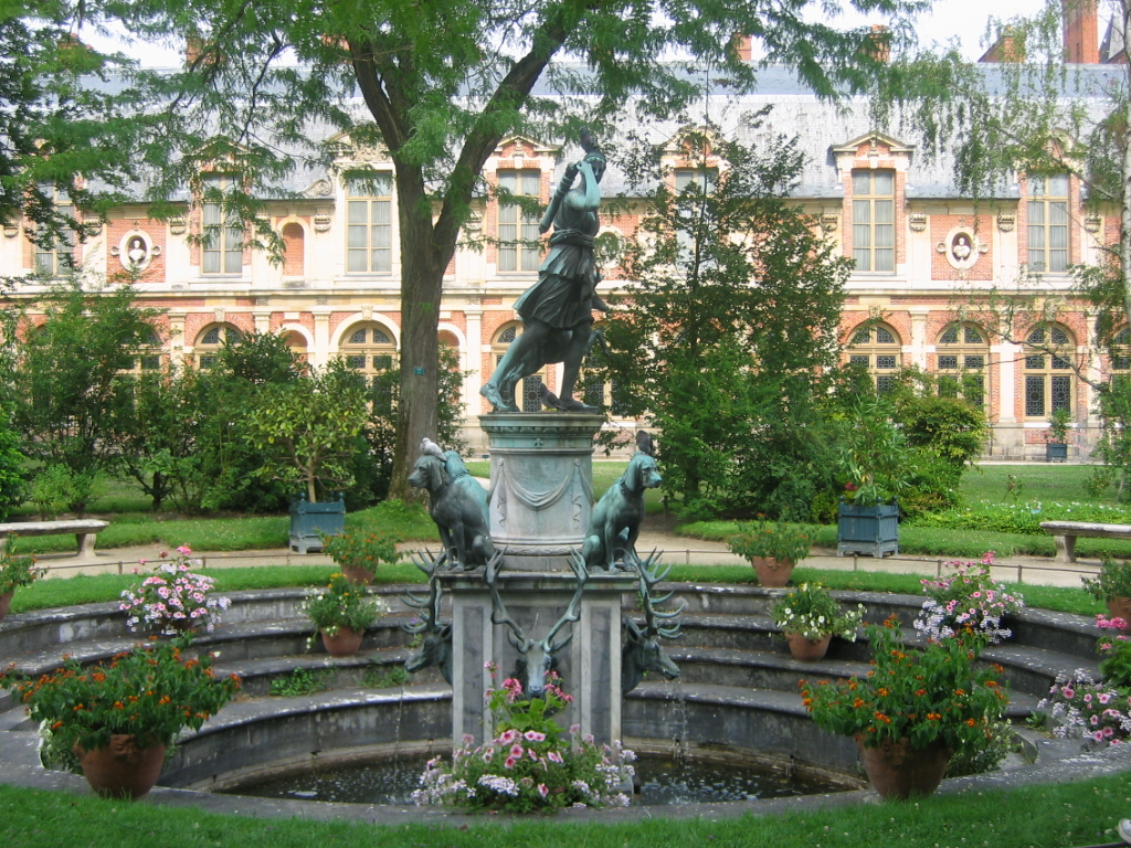 Fontaine de Diane